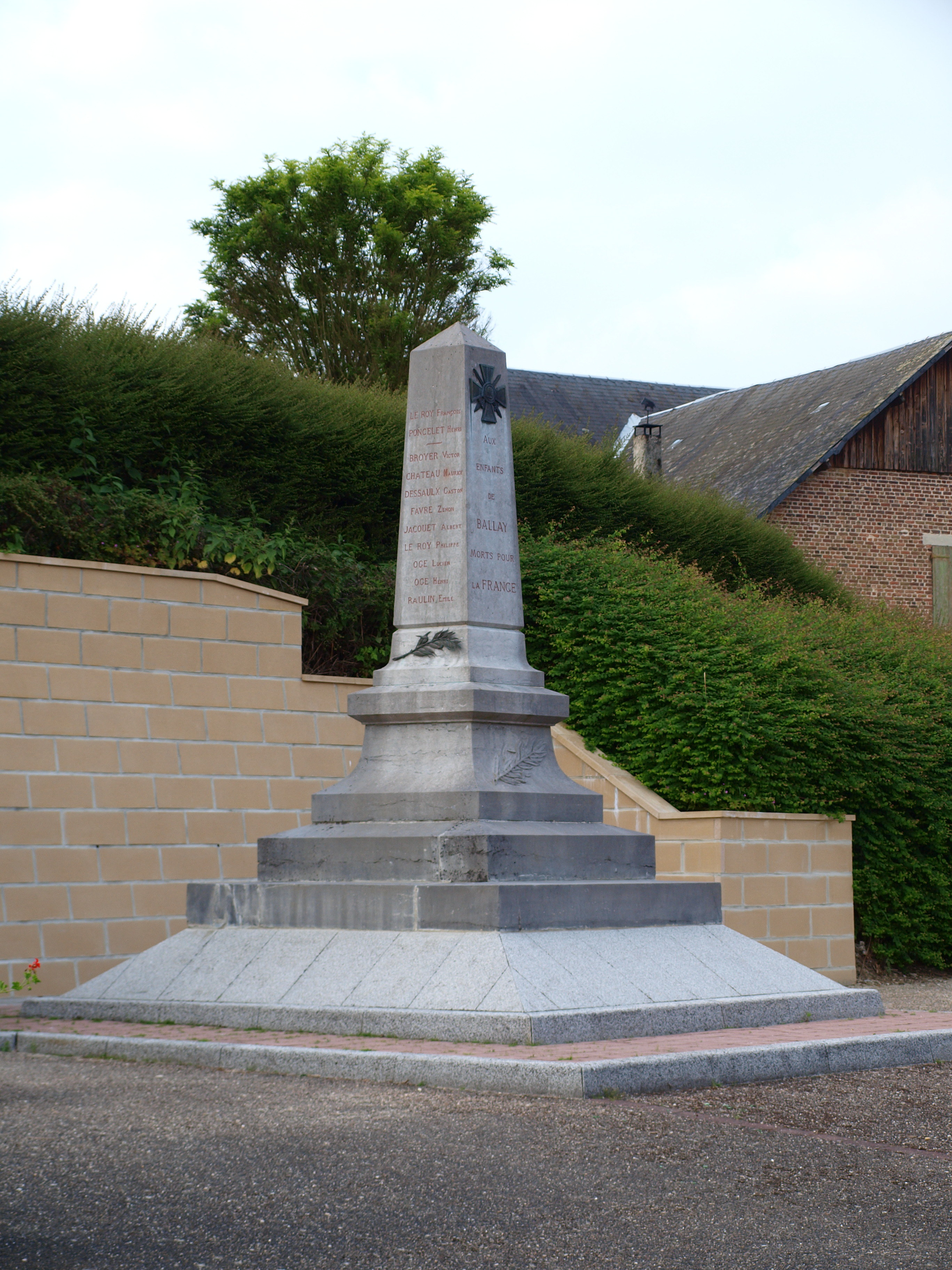 Ballay (Ardennes, France) ; monument aux morts